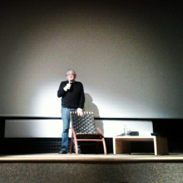 via Instagram instagr.am/p/M1s7YkIkps/